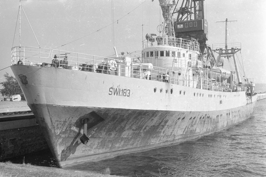 im Scheerhafen.